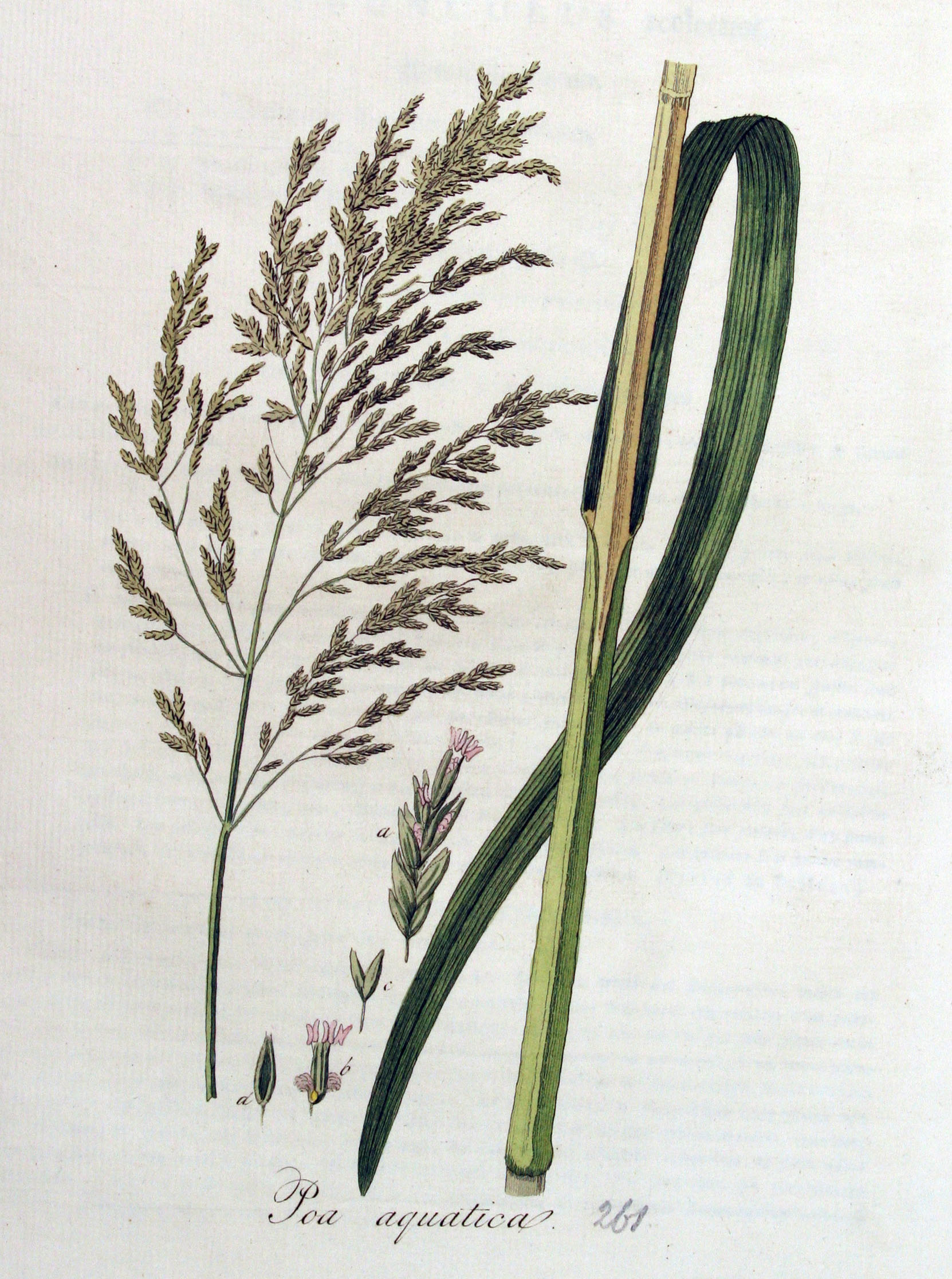 Glyceria maxima (Hartm.) Holmberg (Syn. Poa aquatica L.)